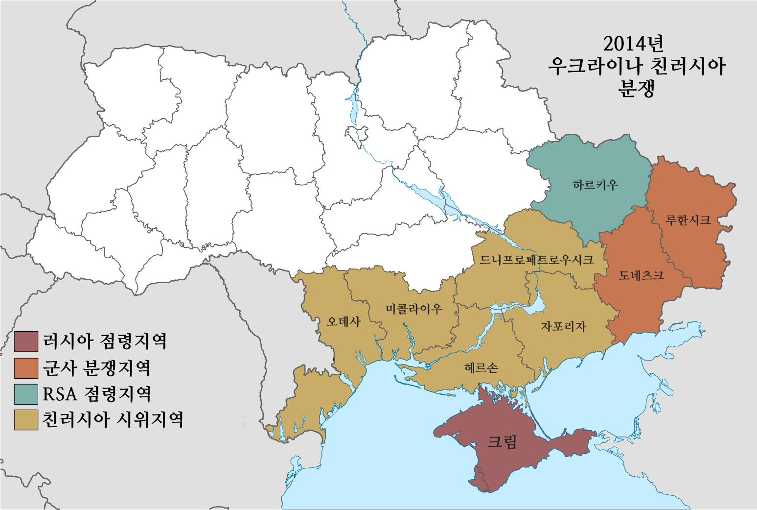 암갈색 : 러시아 점령지역 갈색 : 군사 분쟁지역; 녹색 : RSA 점령지역 연한 고동색 : 친러시아 시위지역